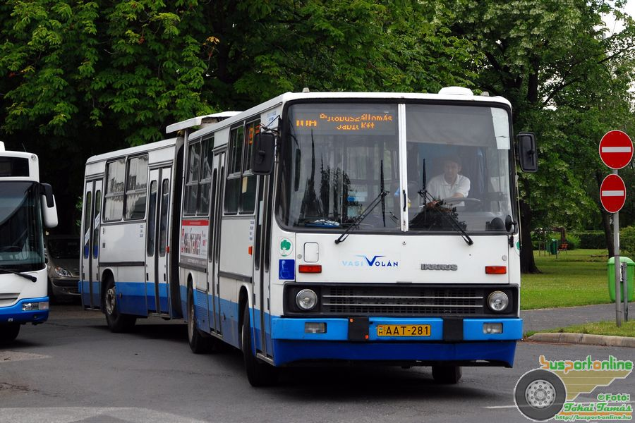 10H busz, Szombathely, Ady tér